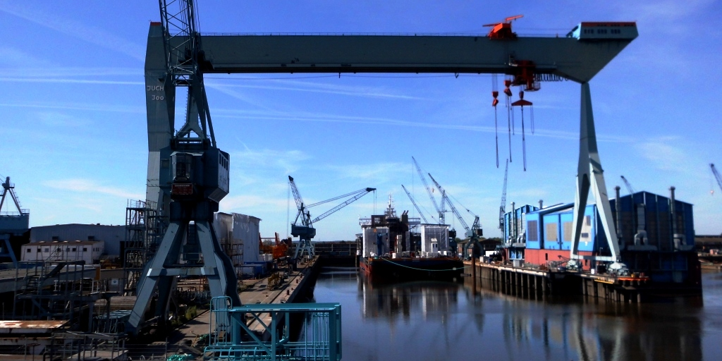 Sietaswerft, Bau desErrichterschiffes Aeolus